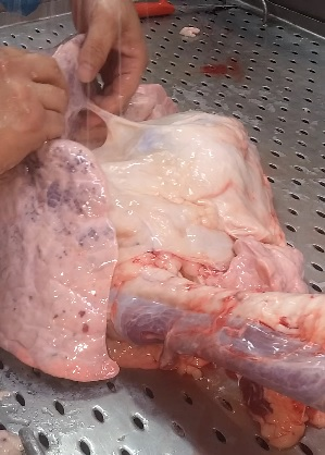 סירכא בין הריאה לשומן הלב